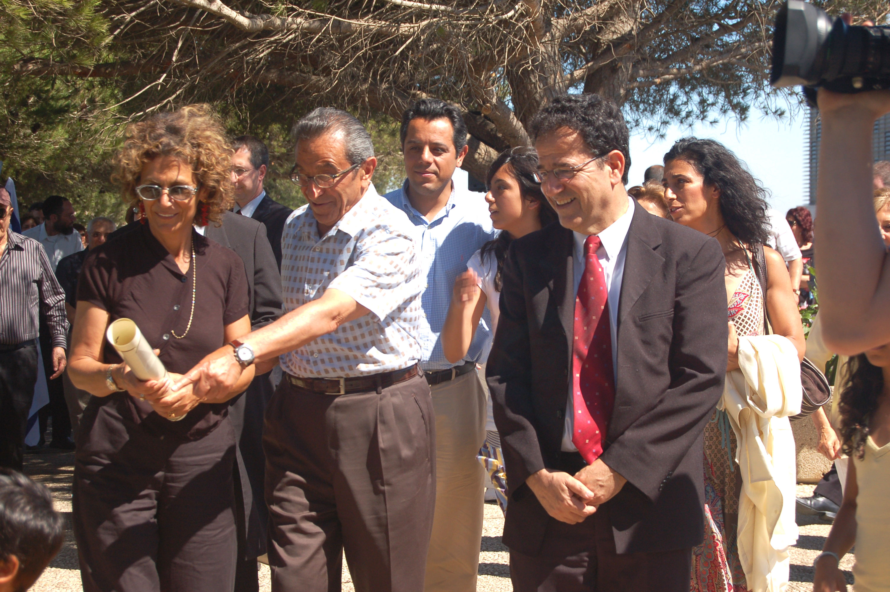 טקס הנחת אבן הפינה לאגף החדש של הספרייה.